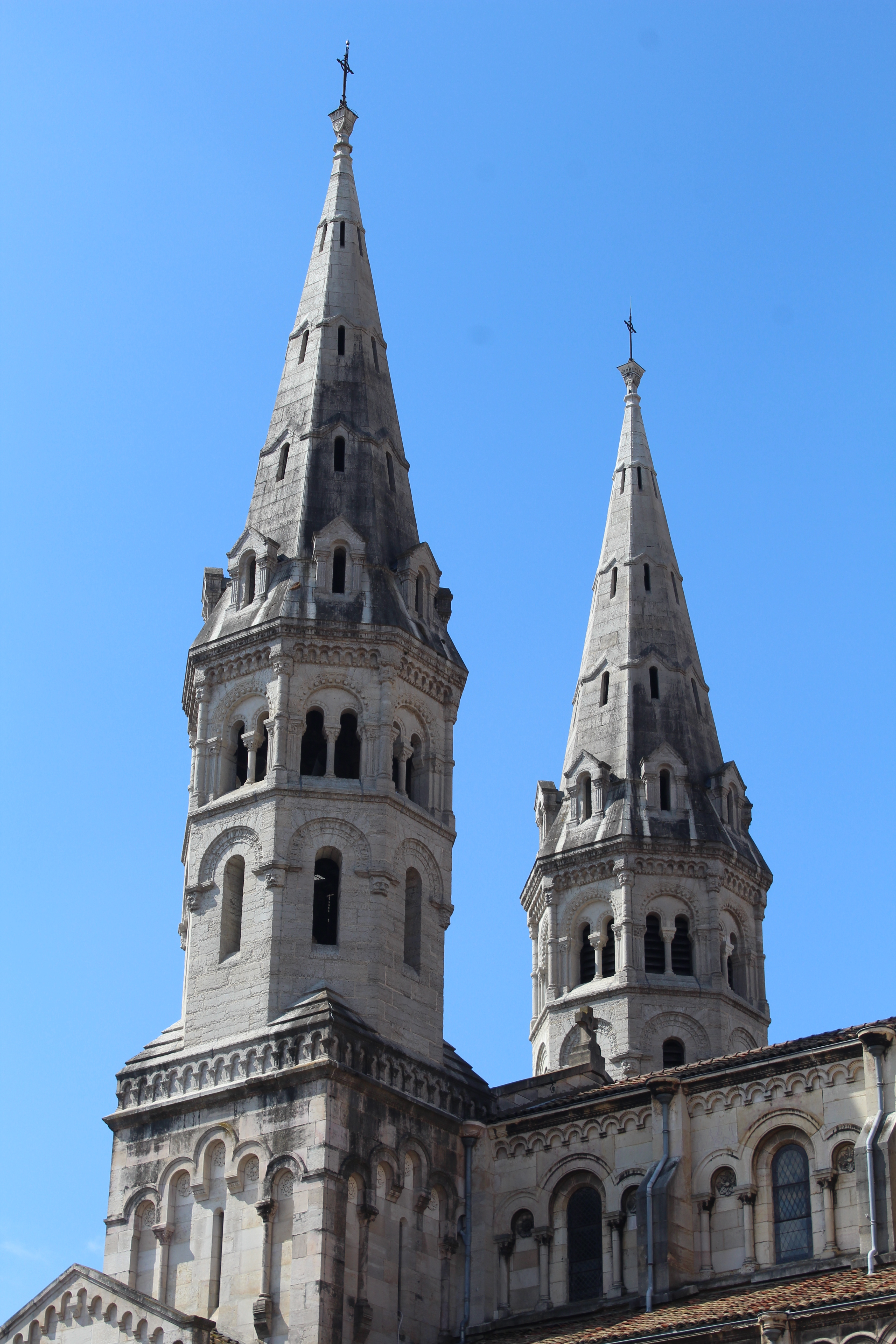 Église Saint-Pierre de Mâcon.